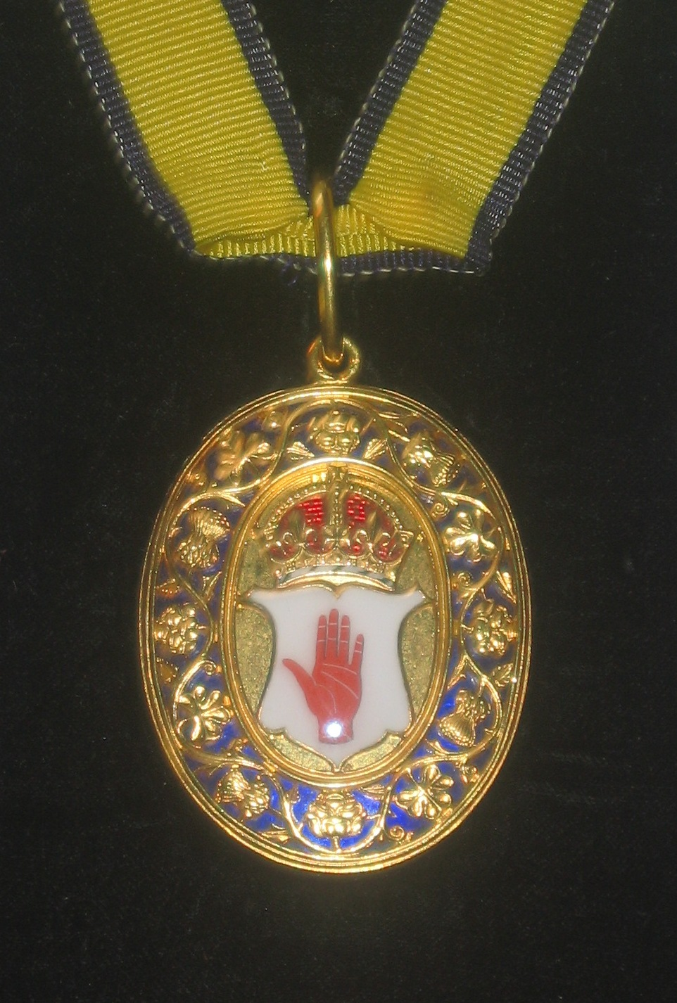 Odznaka baroneta Zjednoczonego Królestwa - Badge of the United Kingdom baronet